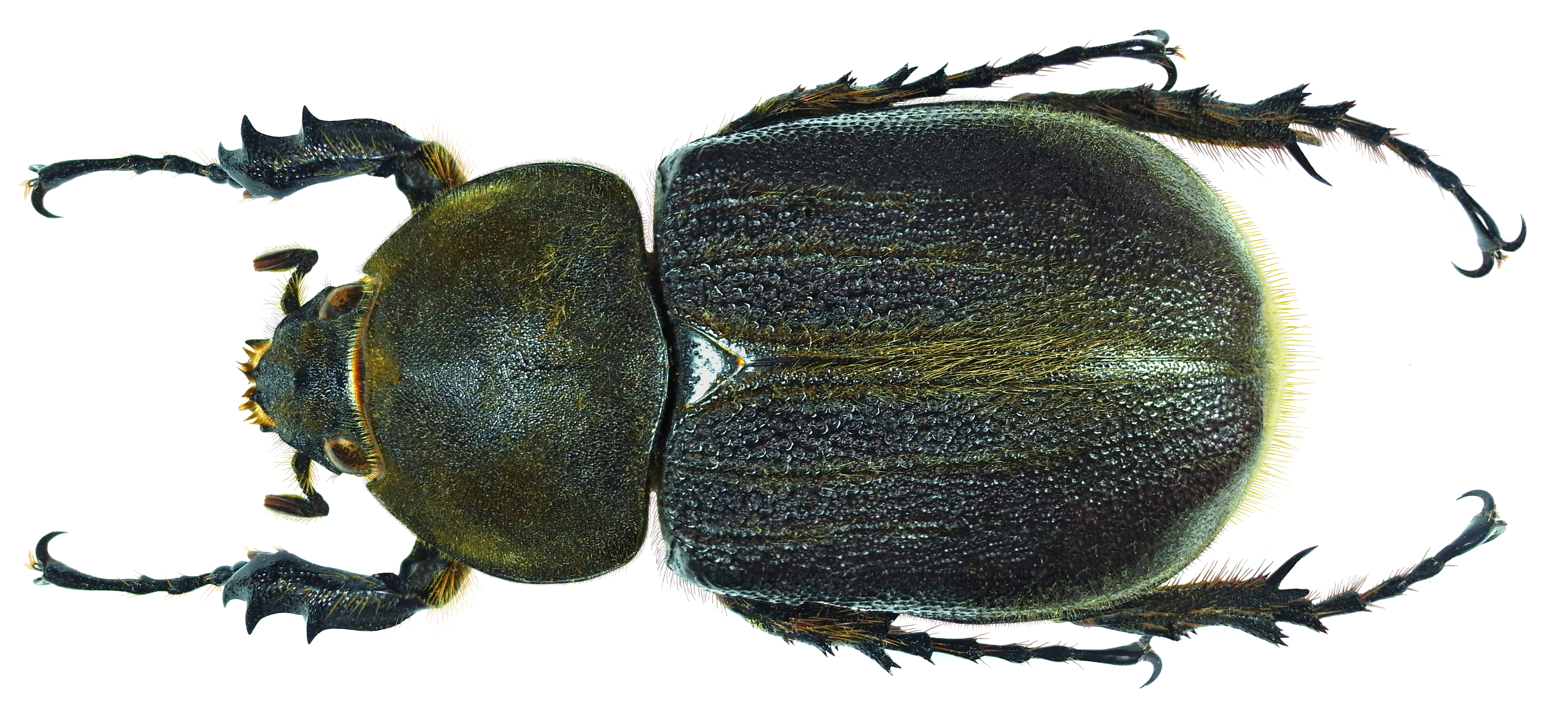 Family: Scarabaeidae (Dynastidae) Size: 62 mm Location: Venezuela, Rancho Grande, VIII.1973 det. U.Schmidt, 2000